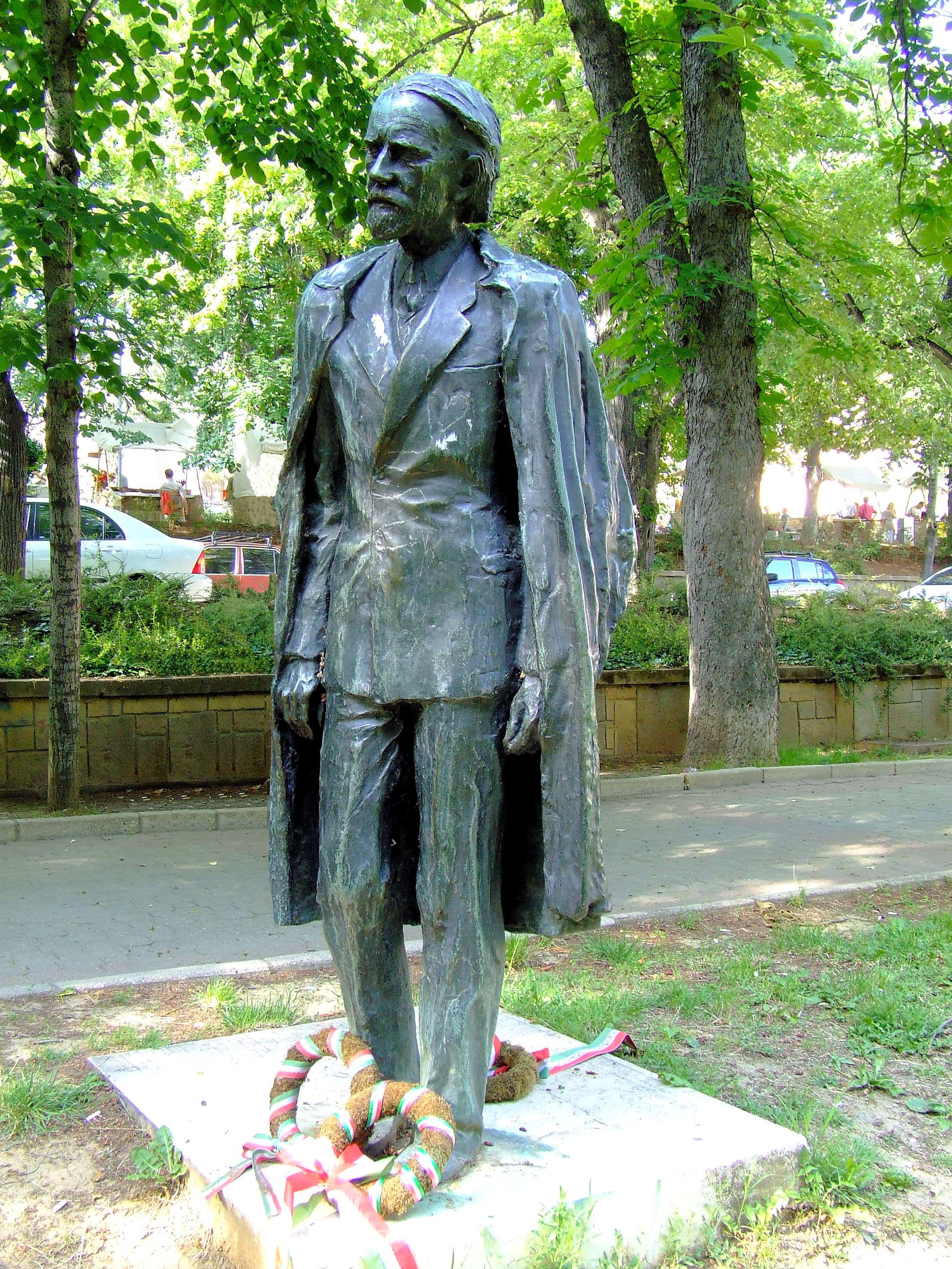 Kodály Zoltán szobra Pécsen. Varga Imre alkotása